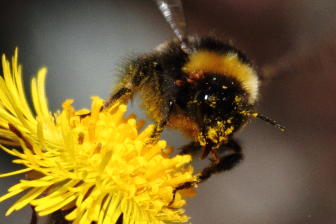 Bombus lucorum pollinating Tussilago farfara in Oldfjällen, Jämtland, Sweden. Cropped version.